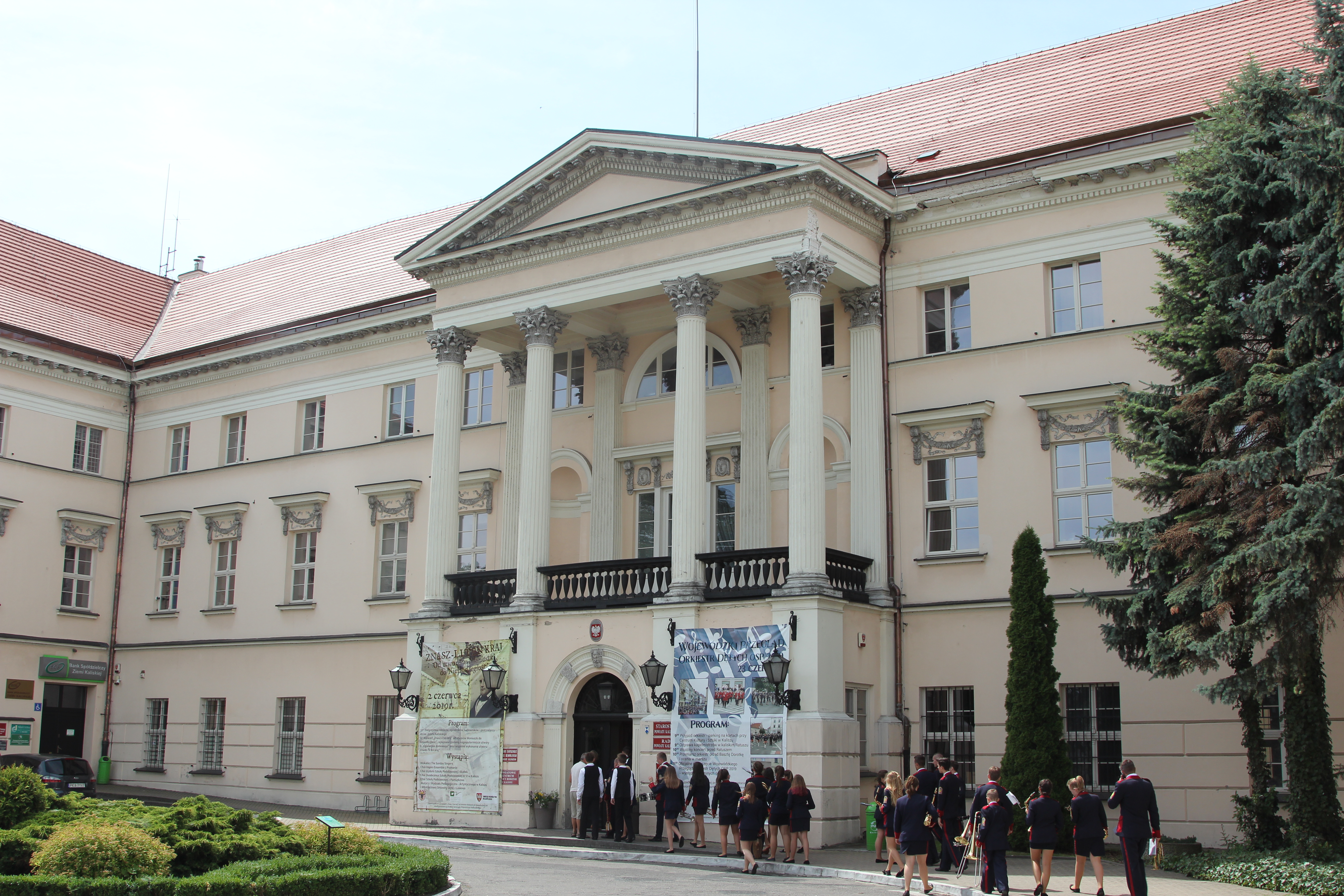 Wojewódzki Przegląd Orkiestr Dętych OSP w Kaliszu (2019) Orkiestra Starostwo Powiatowe